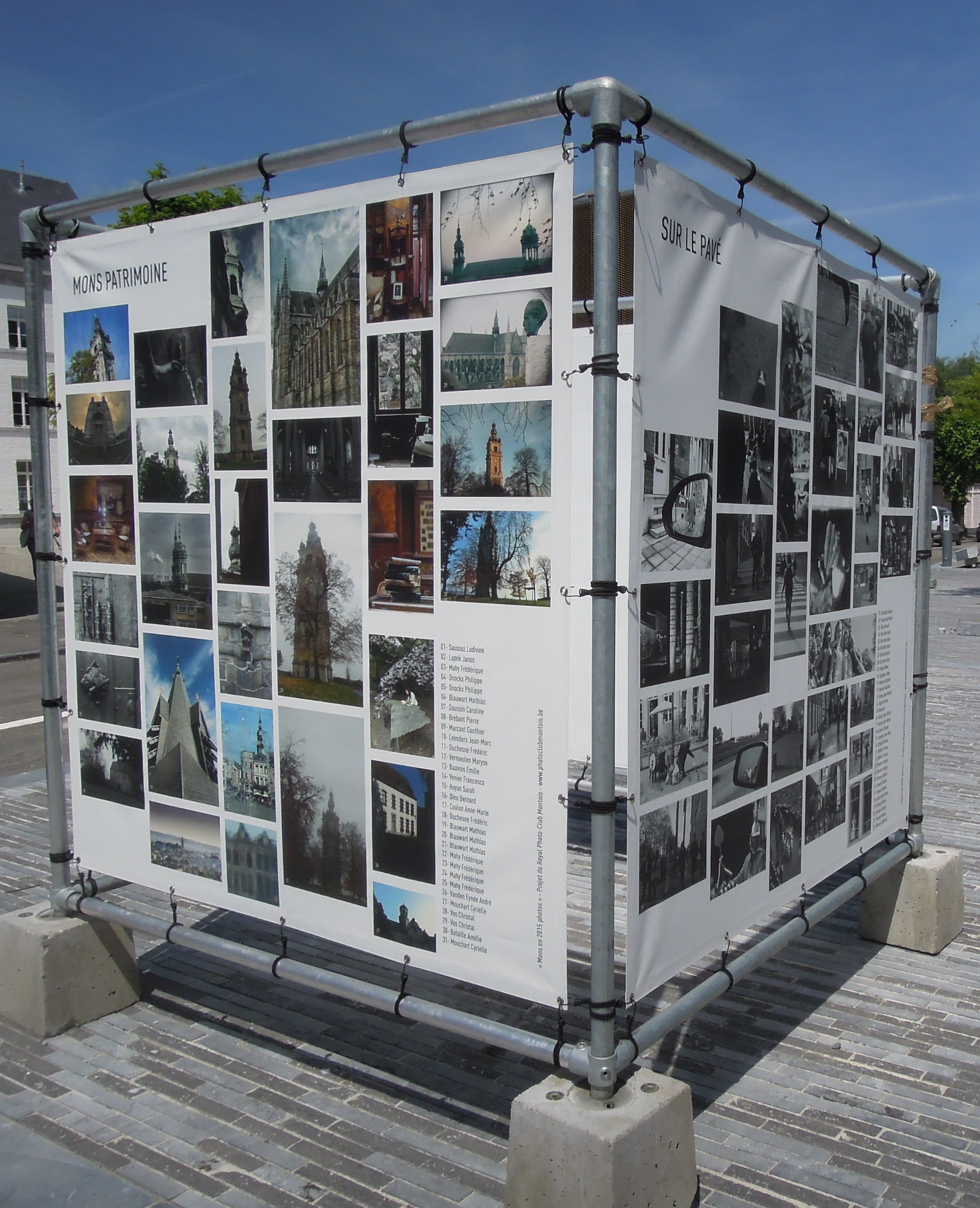 Banner_Kulturhauptstadt 2015 Mons/Belgien mit Fotos von Ulrich Brinkhoff